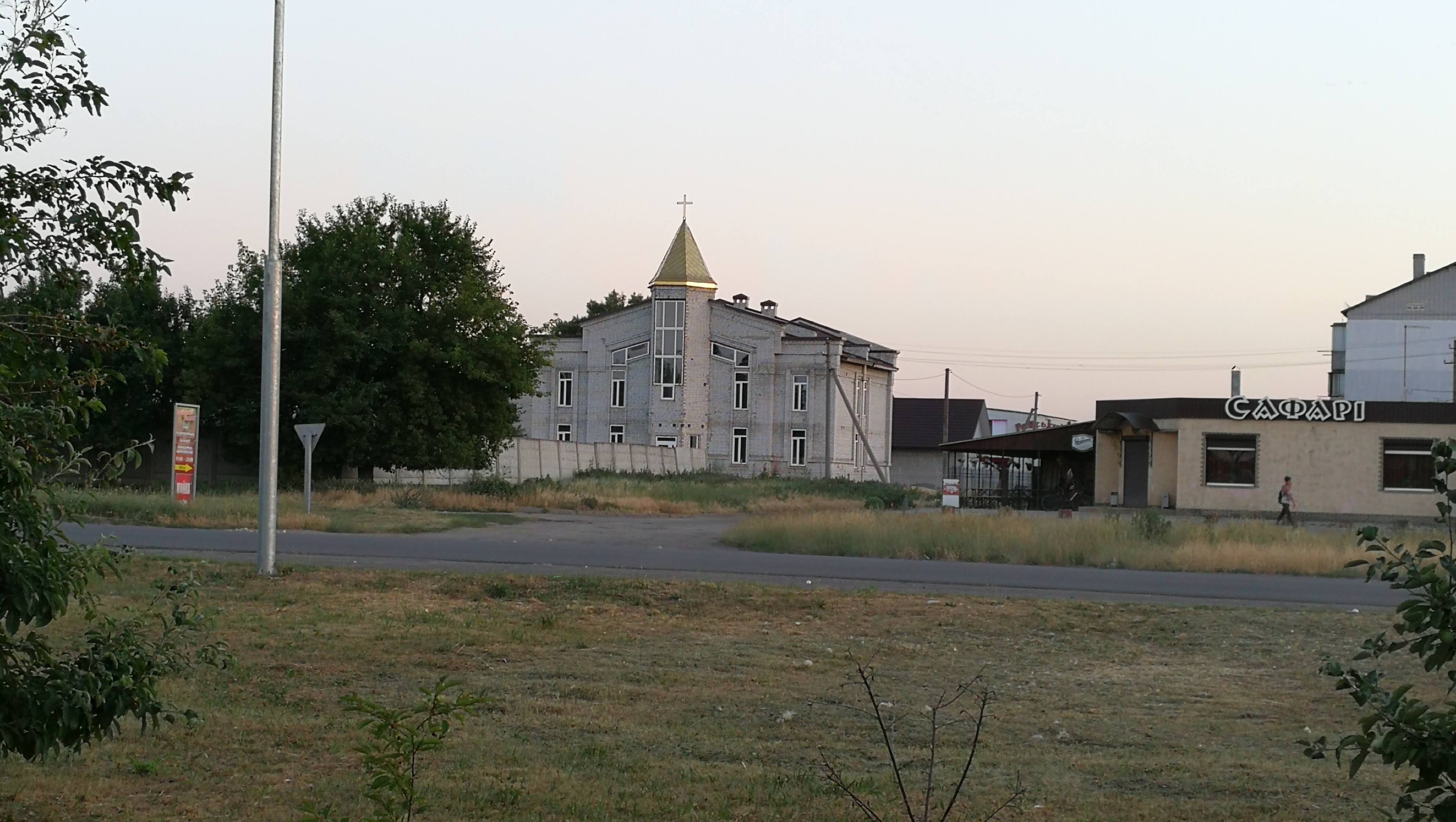 Храм (Дім Молитви) церкви ЄХБ